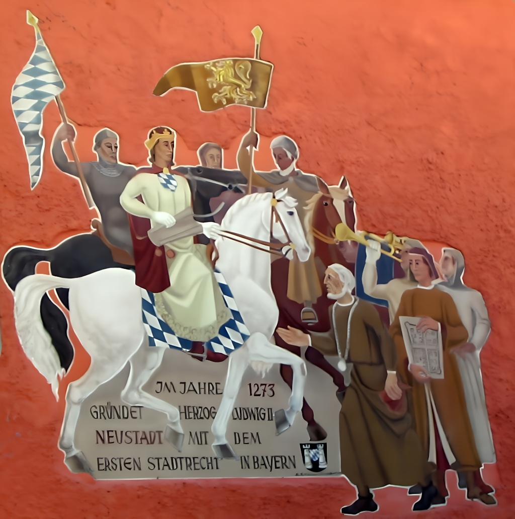 Neustadt an der Donau, Landkreis Kelheim, Niederbayern: Das an der nördlichen Außenwand des Schmidmayer Gebäude Richtung Kirchplatz angebrachte Wandgemälde stellt die Stadtrechtsverleihung durch Herzog Ludwig dem Strengen aus dem Jahre 1273 dar.